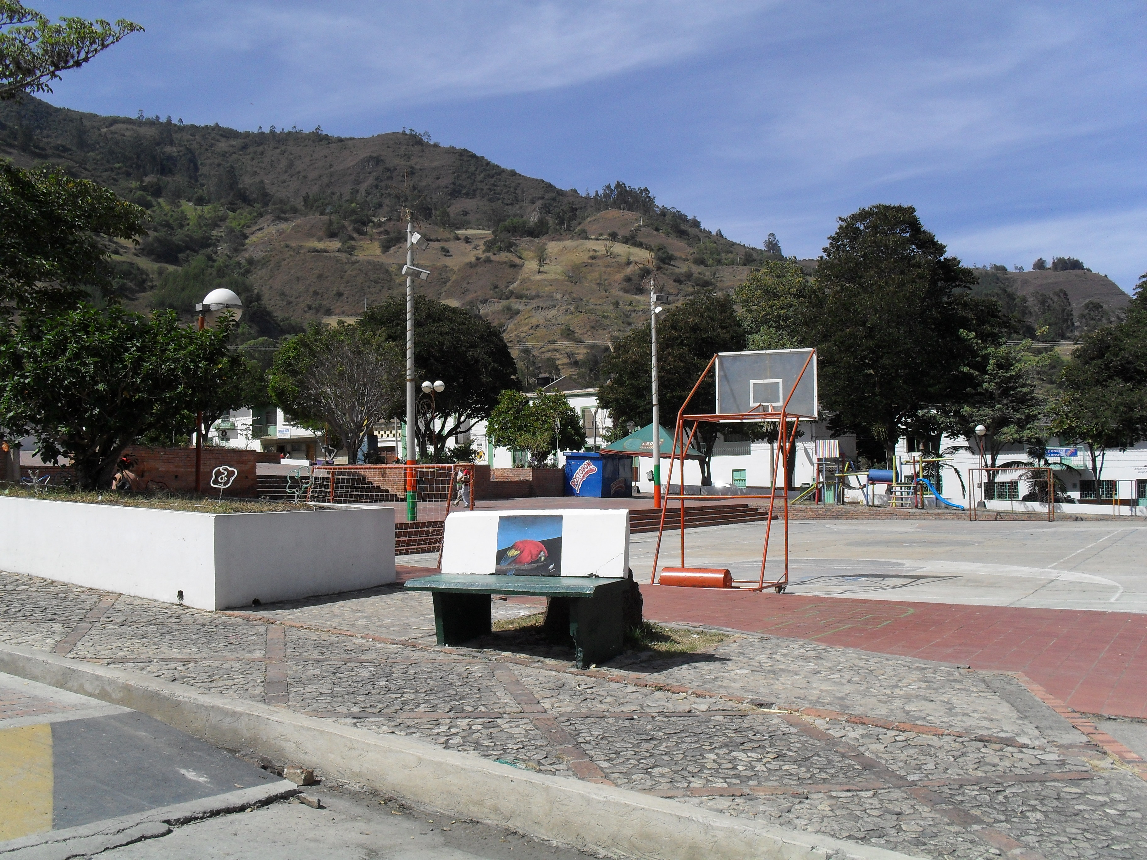 Paque principal municipio de Guacamayas Boayacá